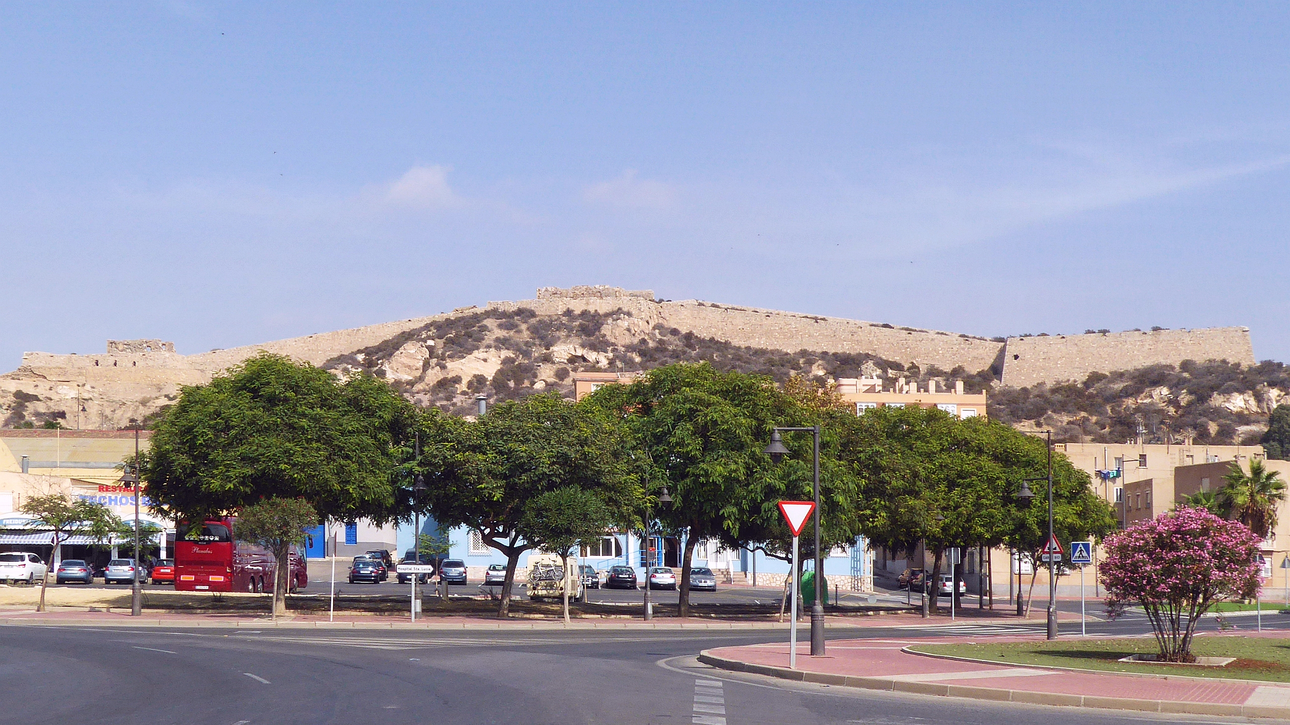 Maurische Wehranlage: Castillo de los Moros erbaut 1773-1778 in nördlicher Richtung gegenüber von Castillo de la Concepción de Cartagena in Cartagena Región de Murcia Spanien - Foto Wolfgang Pehlemann P1200165